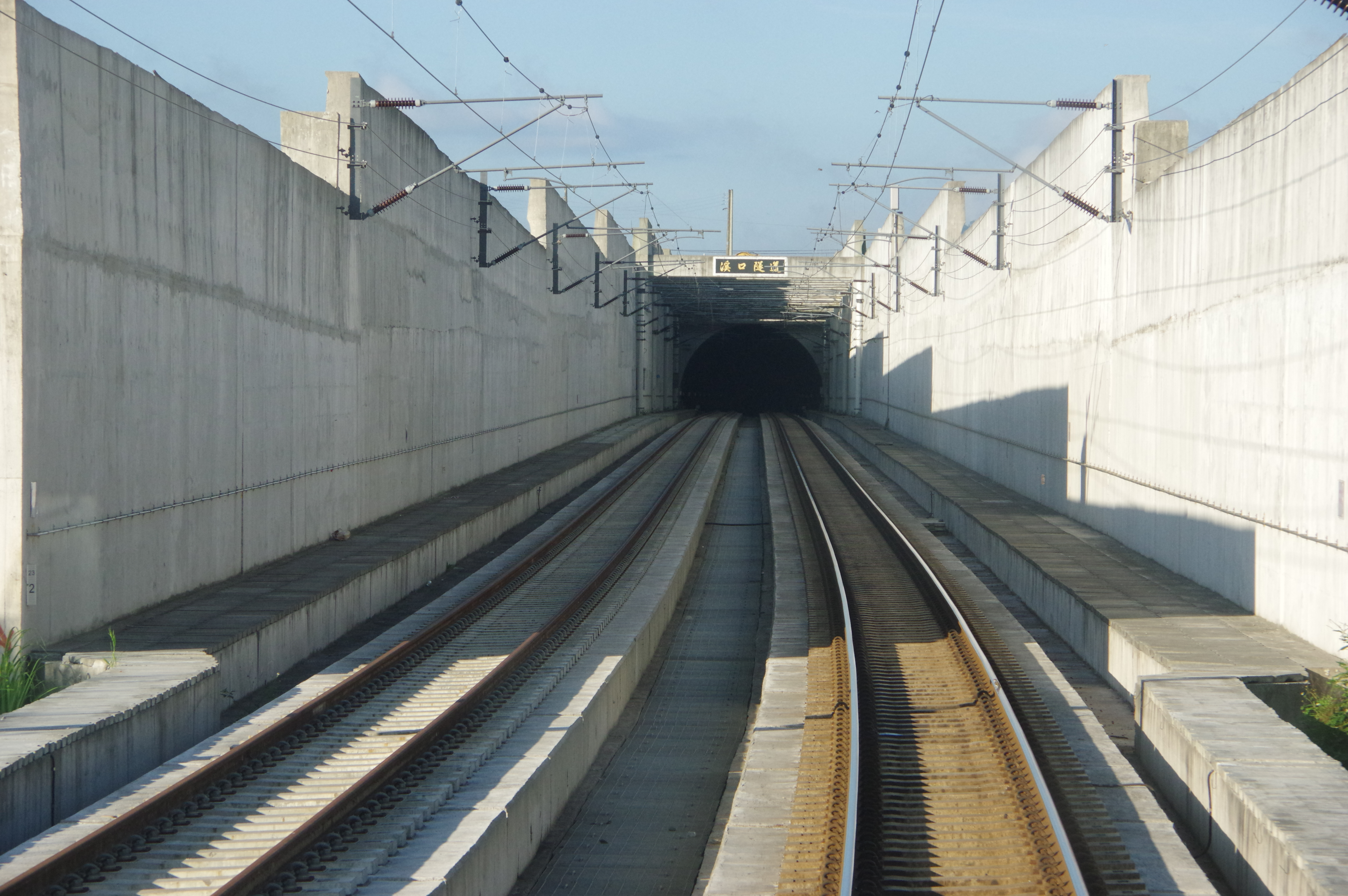 臺灣鐵路管理局臺東線第二代溪口隧道北口